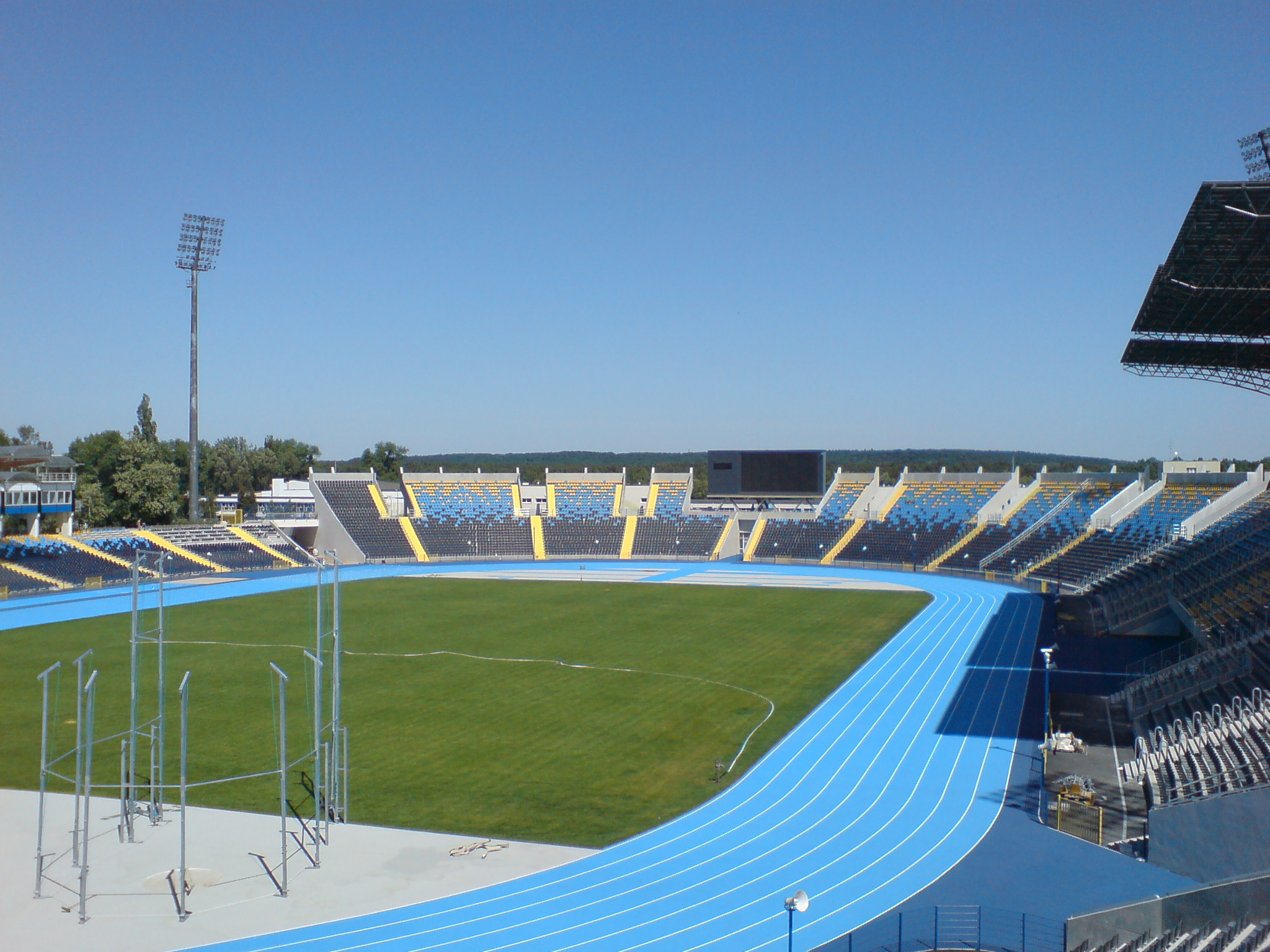 Stadion im. Zdzisława Krzyszkowiaka w Bydgoszczy - widok ogólny.